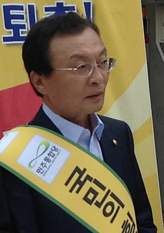 이해찬